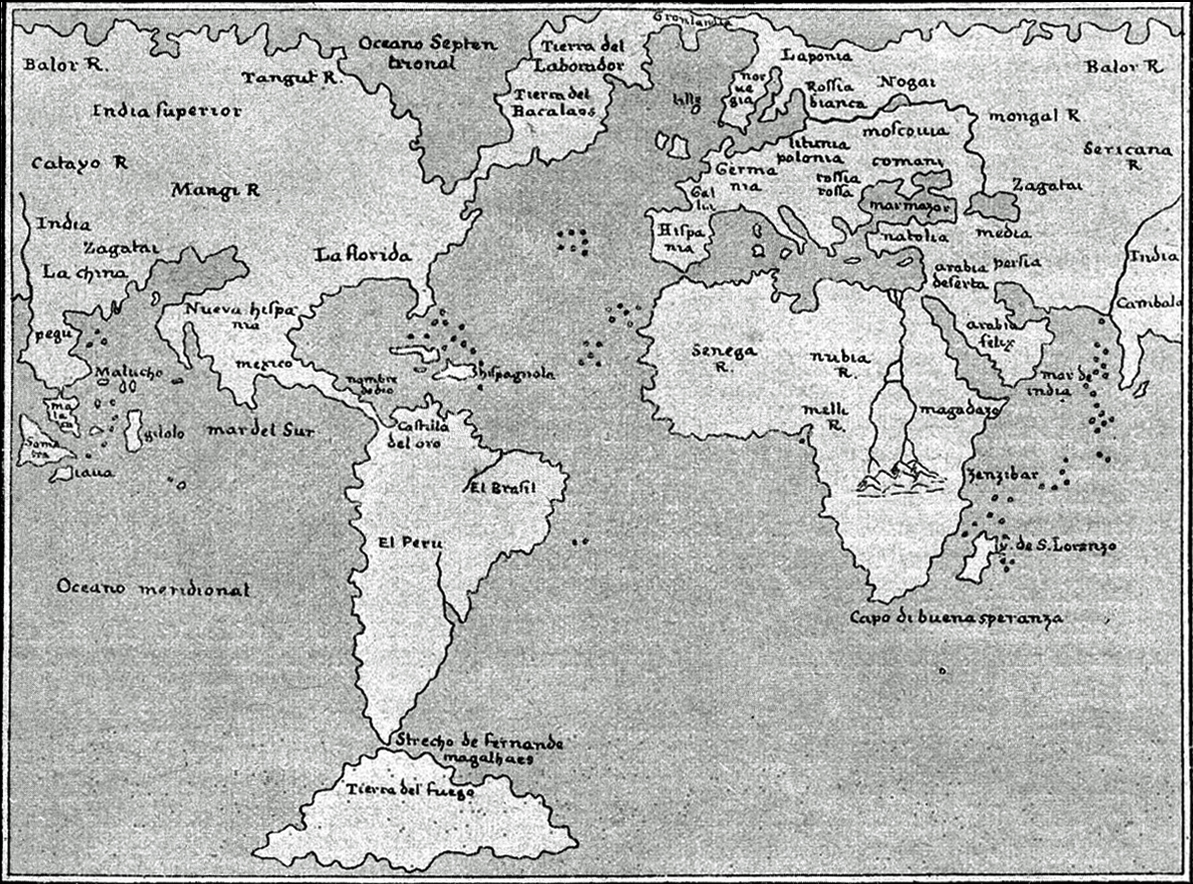 Weltkarte, basierend auf Gastaldis Weltkarte von 1548 in "Atlas Geographia CL Ptolemaei Alexandrini", Venedig 1548